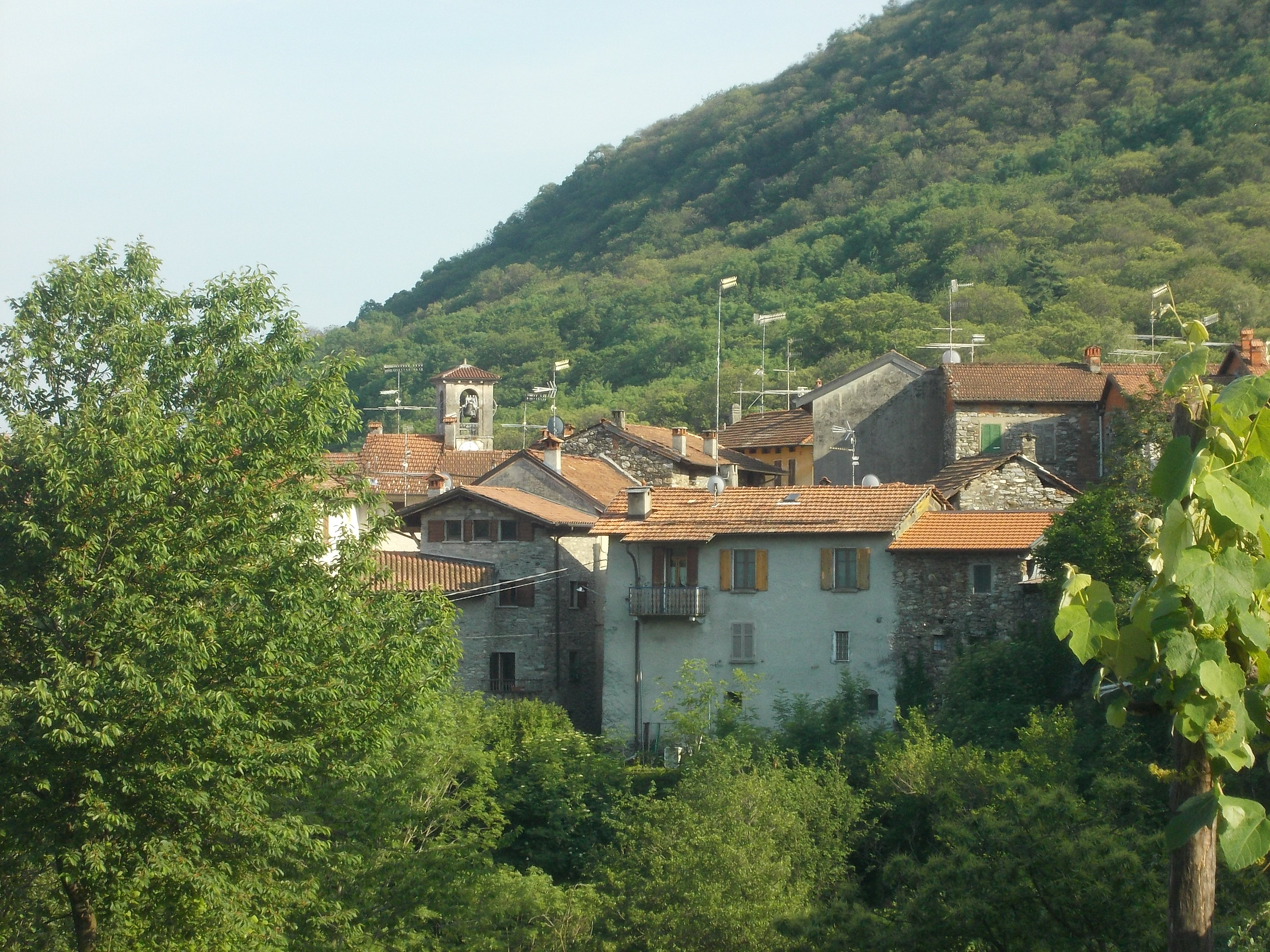 veduta da Graglia